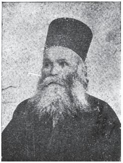 Отец Кръстьо Стефанов от село Орланци, Кичевско (? - 1911).